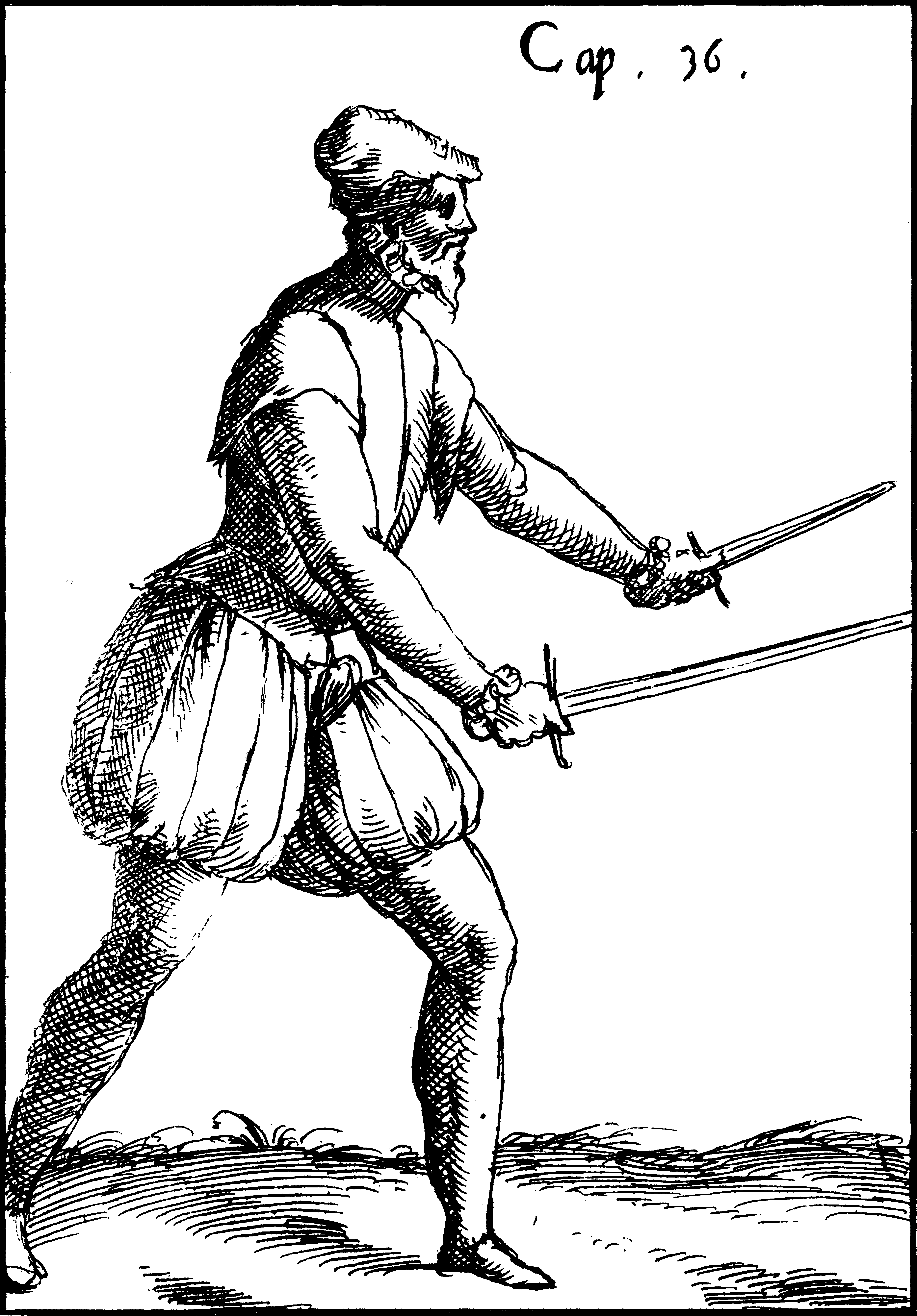 Combat avec l'épée et la dague. Dessin de Achille Marozzo.